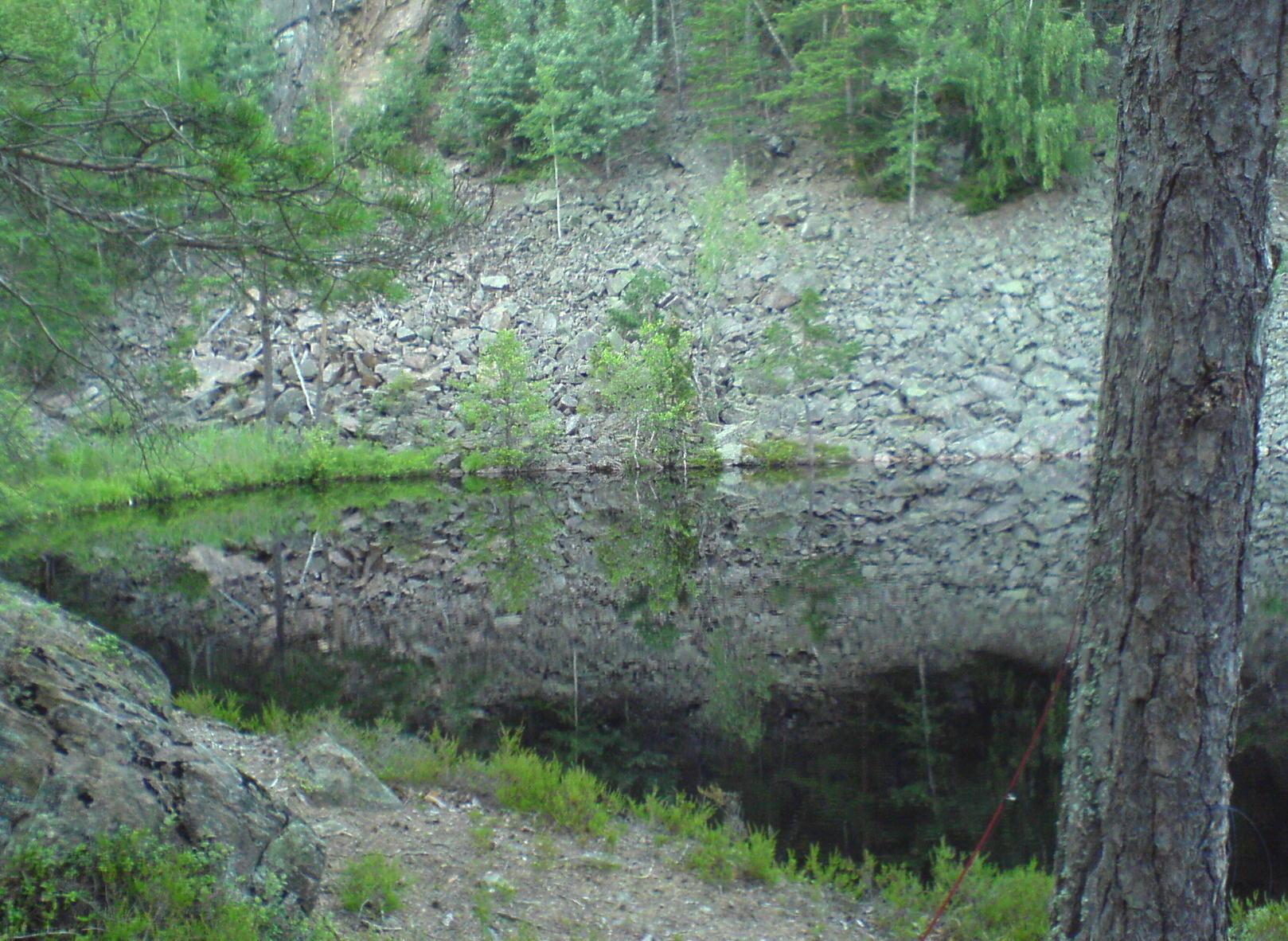 Ura i nordenden av Tasketjern i Aurskog-Høland kommune.